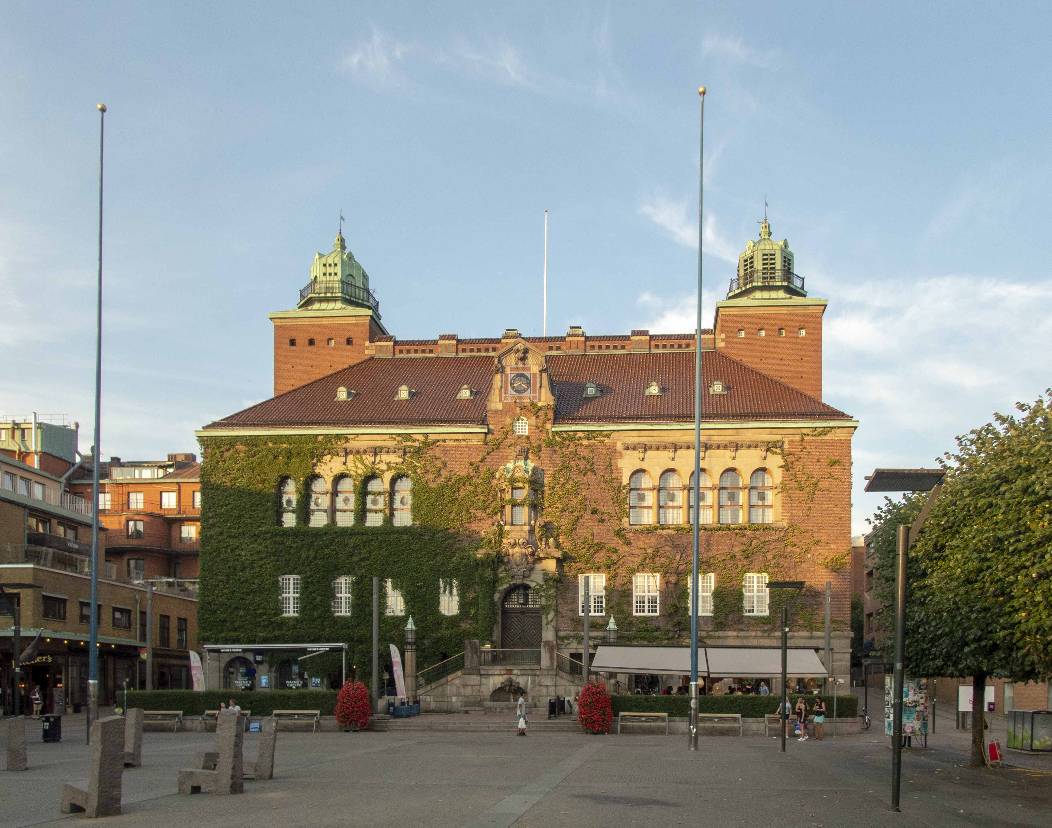 Borås Rådhus. Byggnadsår 1908 - 1910. Broberg (Byggmästare), Ernst Torulf (Arkitekt), Ivar Tengbom (Arkitekt)